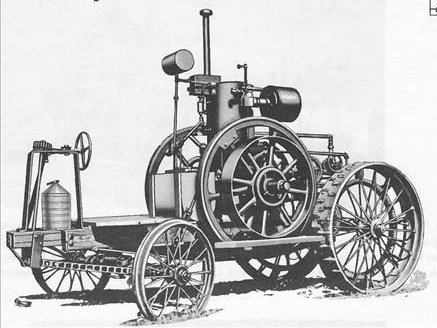 Dessin du tracteur Froelich. Le premier tracteur agricole, conçu par John Froelich en 1892